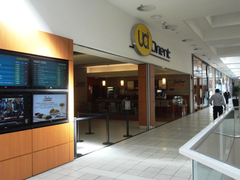 Frente de cine UCI Orient Shopping Paralela